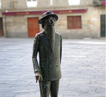 Estatua de Valle-inclán situada en la plaza de Curros Enriquez en la ciudad de Pontevedra, Galicia.